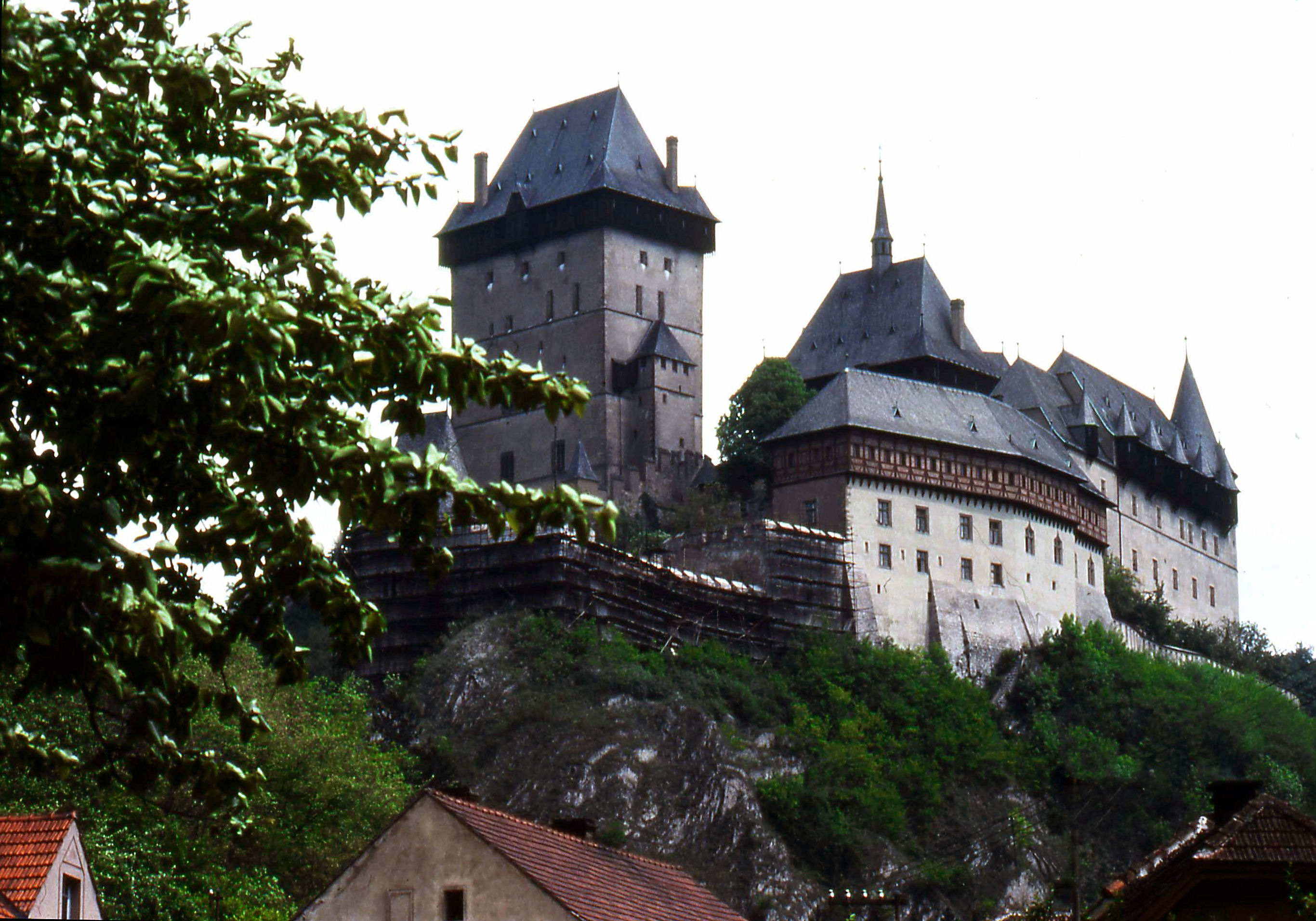 Castle, Karlstein, Chech.